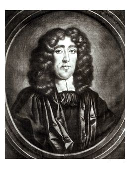 Titus Oates (1649-1704)